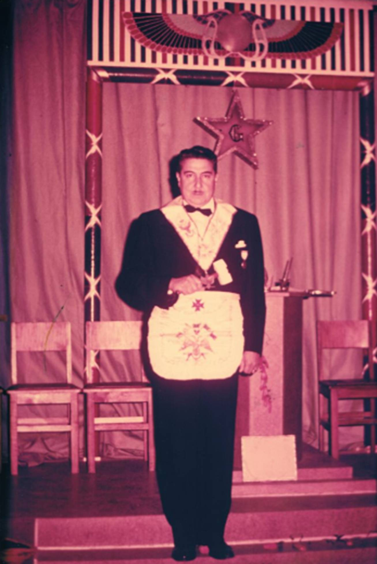 Antonio Quezada Urzúa, Primer Gran Maestro y fundador del Gran Oriente de Chile. (30 de Enero de 1907 - 25 de Agosto de 1979). Antonio Quezada, nació en Santiago el 30 de Enero de 1907 y falleció el 25 de Agosto de 1979; estudió en el Seminario de Valparaíso y en la Escuela Militar donde se graduó de Ingeniero Geógrafo y fue uno de los Fundadores de la Academia Politécnica. Trabajó en el Instituto Geográfico Militar, donde llegó a ocupar los cargos de Jefe de Secretaria Técnica y jefe de Inspección General del Ejército con misiones en Asuntos limítrofes con Argentina. Por un accidente en el año 1949 se retira del Ejército con el grado de Comandante. Estudia Pedagogía en la Universidad de Chile y se titula de profesor de Estado. Fue Rector del Liceo Fiscal Nº 1 de Santiago y profesor del Instituto Nacional. Escribe un libro "Etnografia de América el Sur" y trabajos sobre Isla de Pascua. Fue Director y fundador de la Revista "Geográfica de Chile".